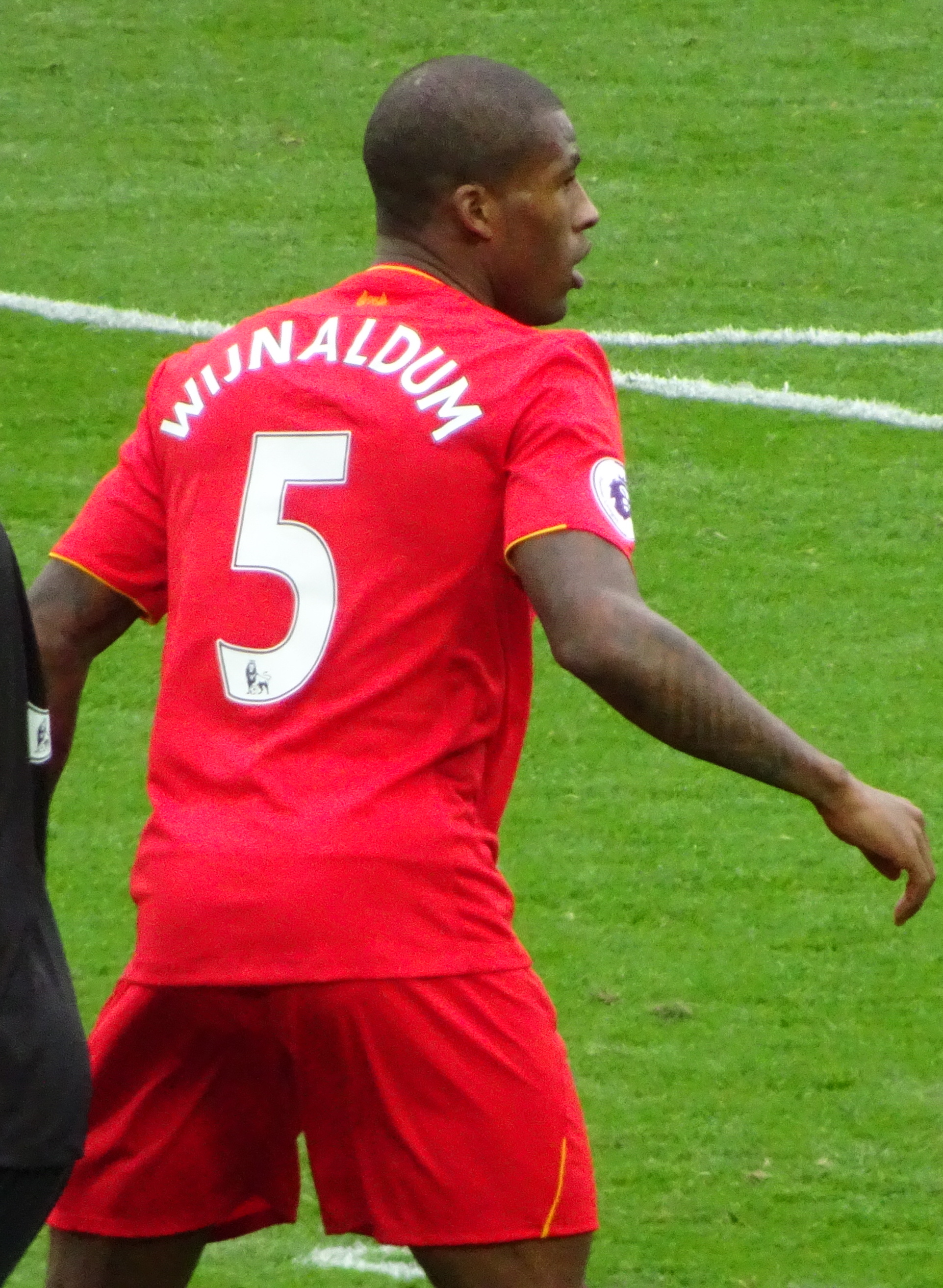 Marking Up